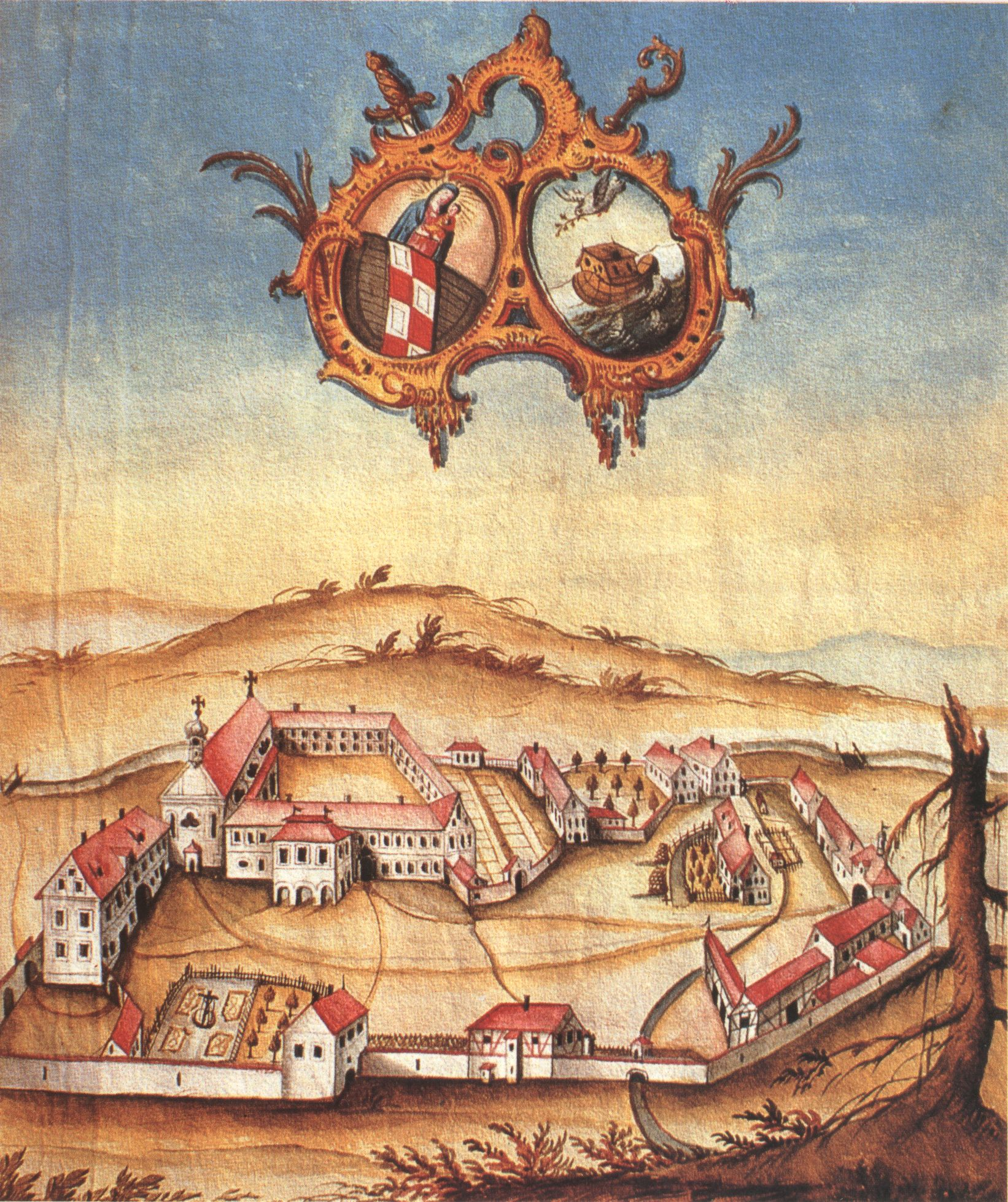 Reichsabtei Gutenzell. Ansicht des Klosters um 1770. Oben das Wappen der Reichsabtei und das Wappen der Äbtissin Maria Alexandra Zimmermann.